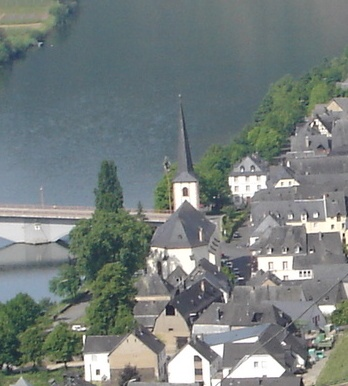 Weinberge über Piesport